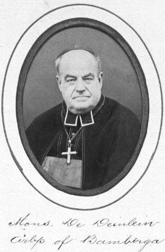 Erbischof Michael von Deinlein, Bamberg, 1870, I. Vaticanum